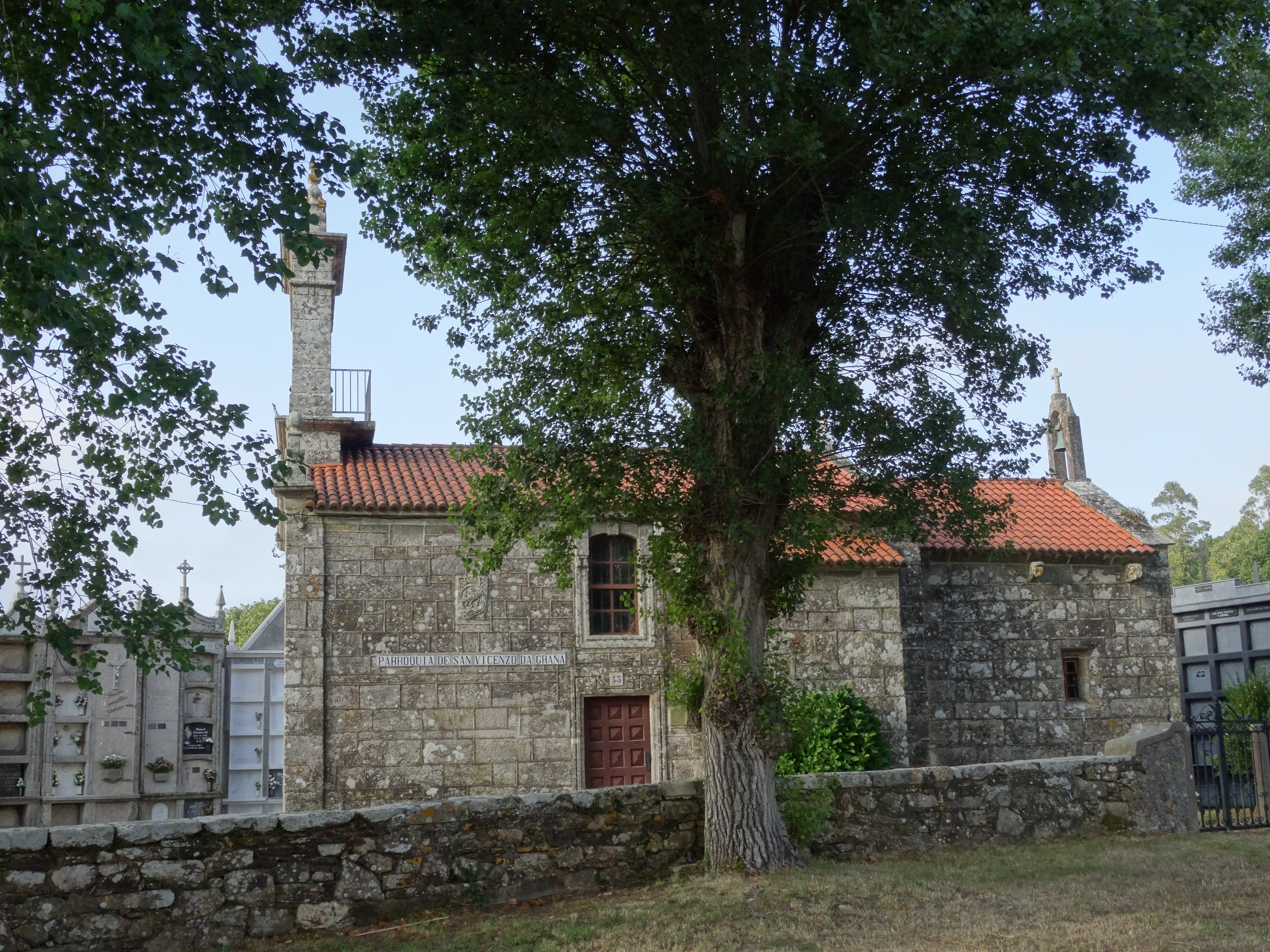 Lateral da igrexa da Graña, Ponteceso.